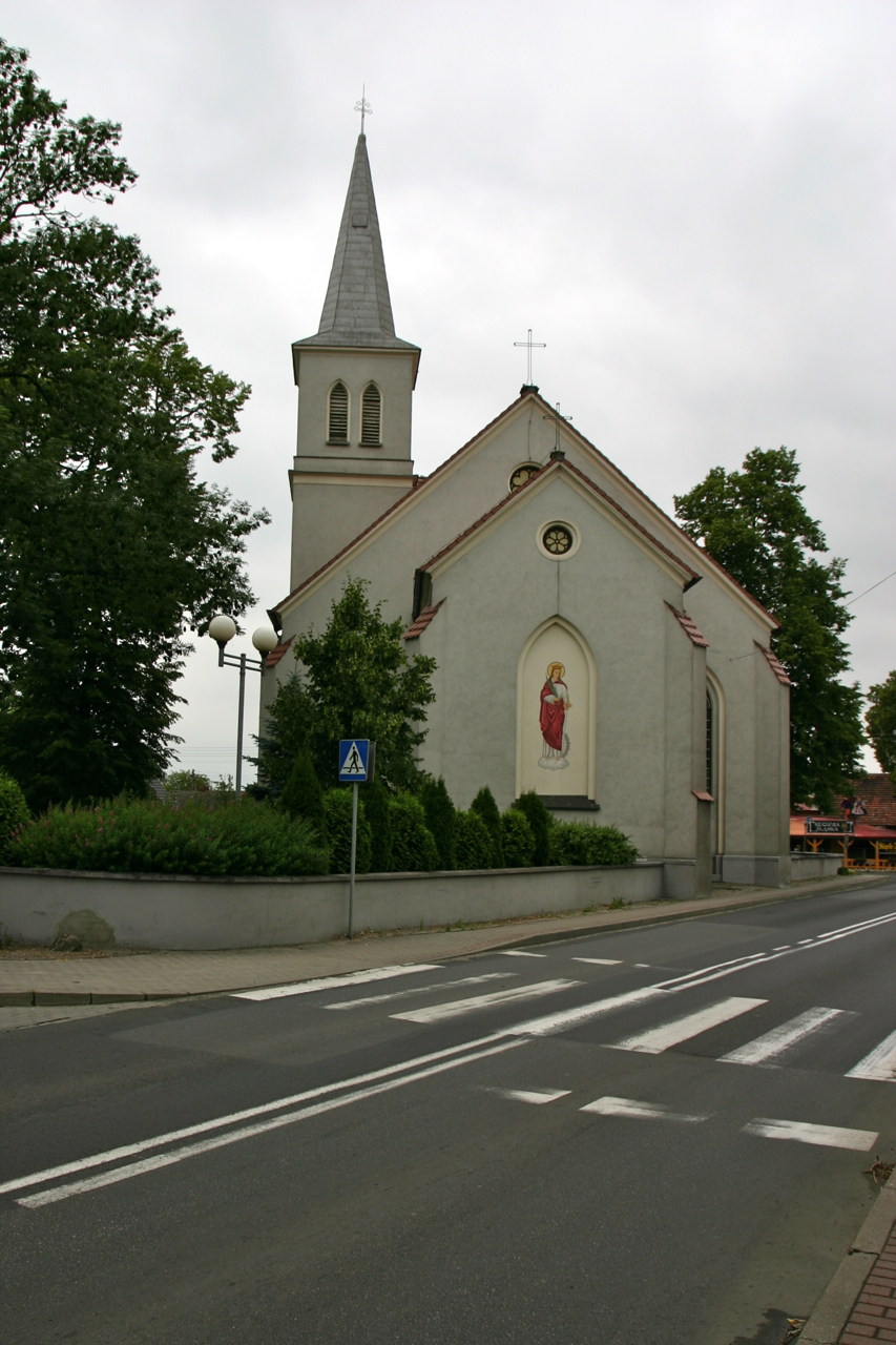 Dobrzeń Wielki (dodatkowa nazwa w j. niem. Groß Döbern; śl. Wielki Dobrzyń) – wieś w Polsce, położona w województwie opolskim.